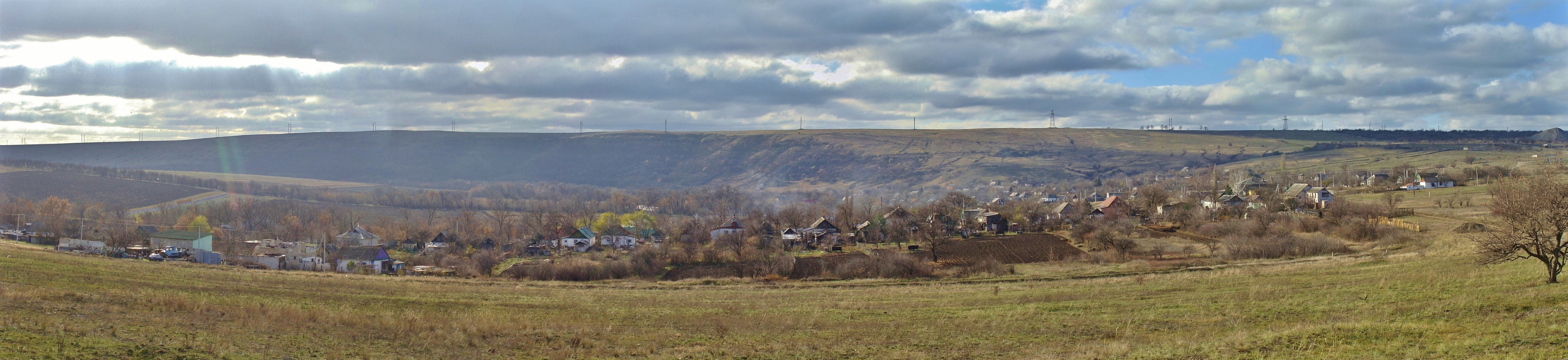 Николаевка (Зугрэс).